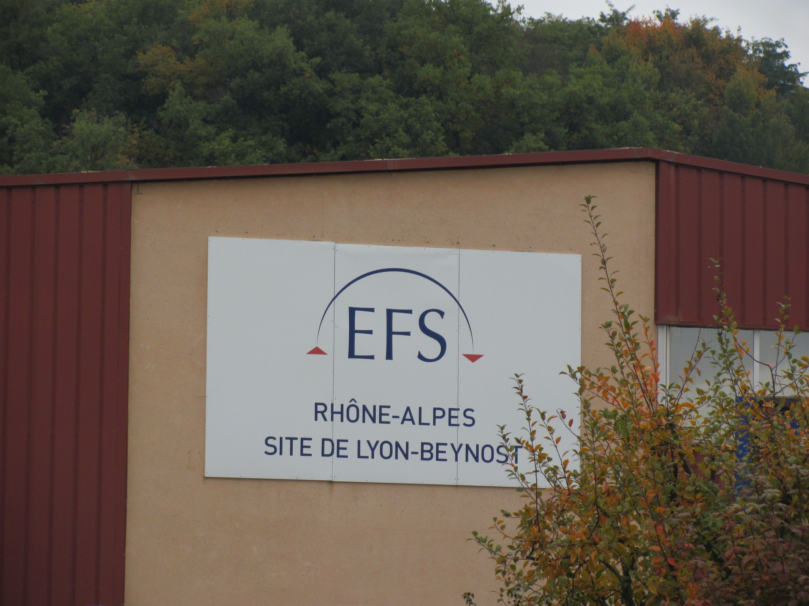 EFS Beynost.